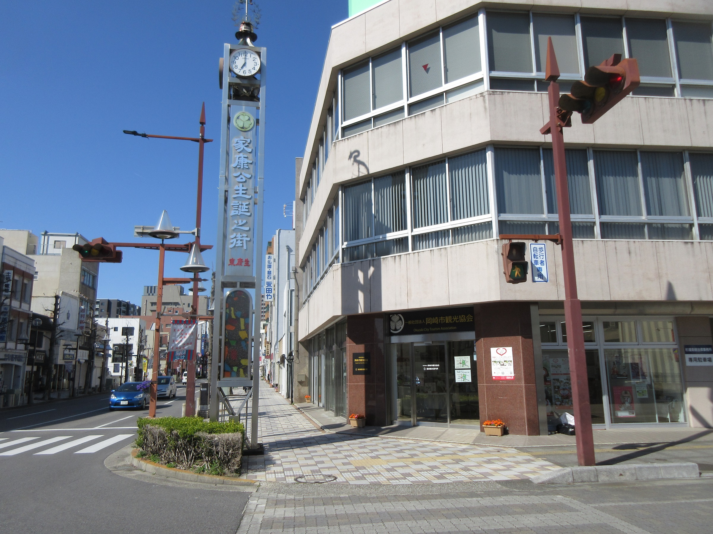 一般社団法人岡崎市観光協会（岡崎市康生通東）